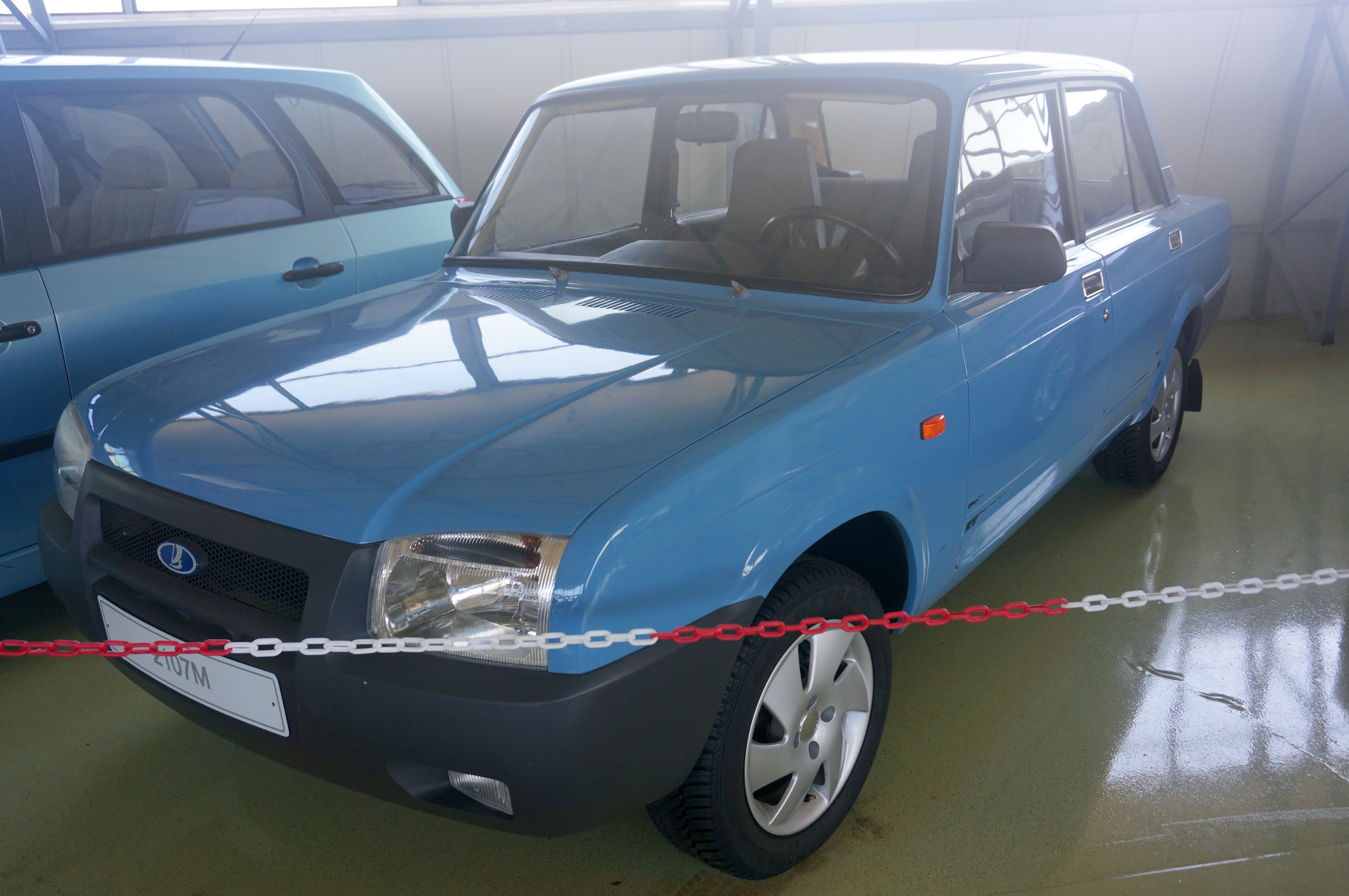 ВАЗ 2107М, модель, предполагавшаяся в качестве замены на конвейере для ВАЗ-2107